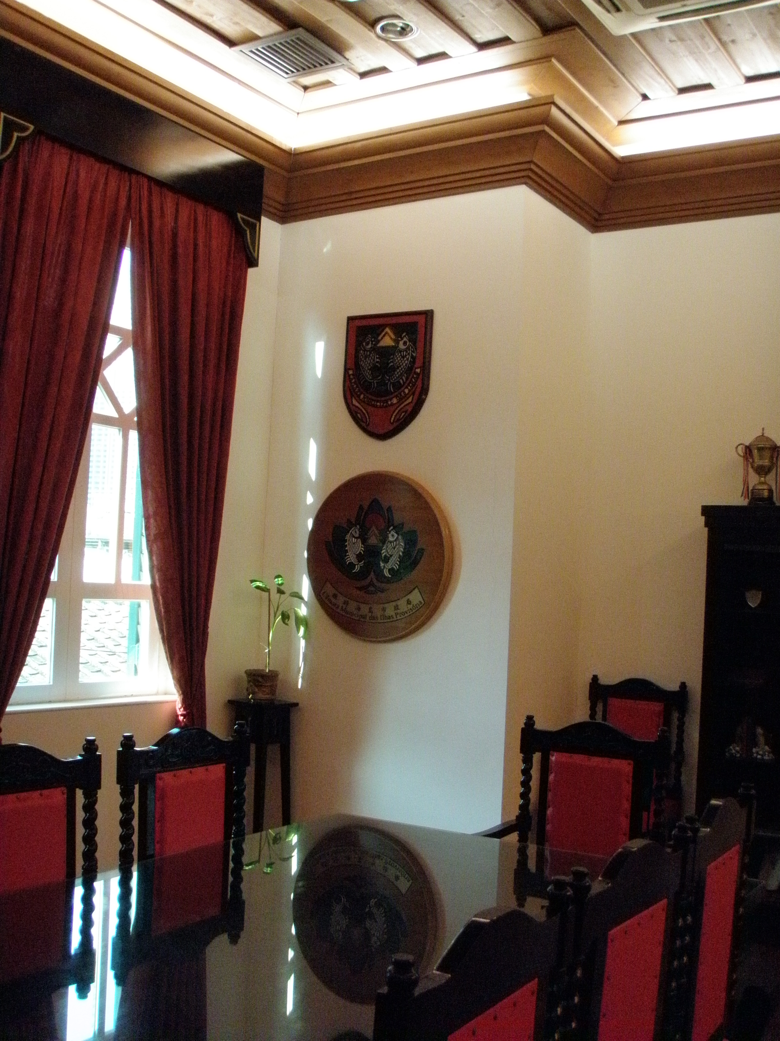 CMI e CMIP